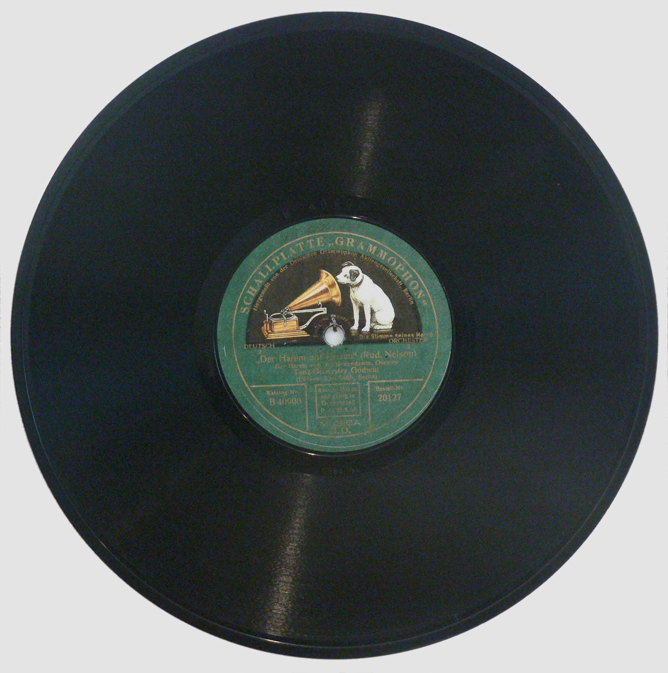 Schellackplatte Schallplatte „Grammophon“, Hergestellt von der Deutschen Grammophon-Aktiengesellschaft, Berlin, DEUTSCH 2, Die Stimme seines Herrn, ORCHESTER 2, „Der Harem auf Reisen“ (Rud. Nelson) Der Harem vom Kurfürstendamm, Onestep, Tanz-Orchester Godwin, Best. Nr. 20127 Landesmuseum Württemberg (Außenstelle Museum für Volkskultur in Württemberg, Waldenbuch)